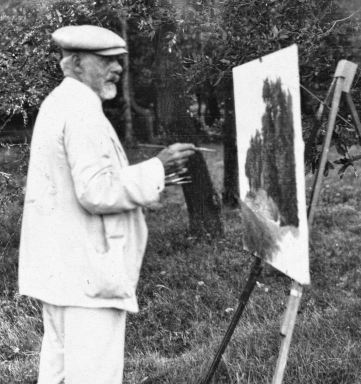 Szinyei Merse Pál apostol Kristóf Ágoston Ulrik Félix (Szinyeújfalu, 1845. július 4. – Jernye, 1920. február 2.) magyar festő.